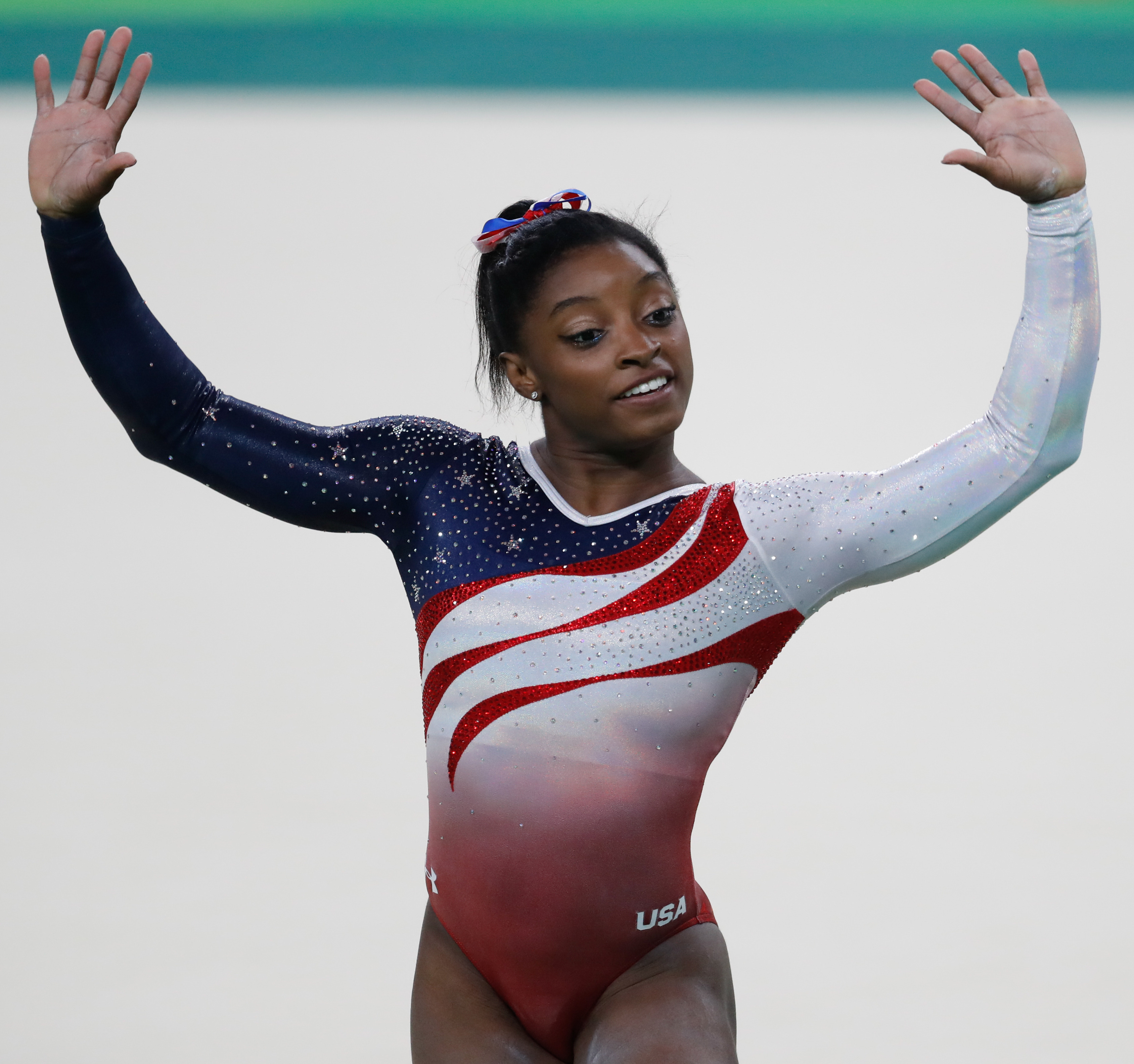 Rio de Janeiro - Simone Biles, ginasta dos Estados Unidos, durante final em que levou medalha de ouro na disputa por equipes feminina nos Jogos Olímpicos Rio 2016. (Fernando Frazão/Agência Brasil)